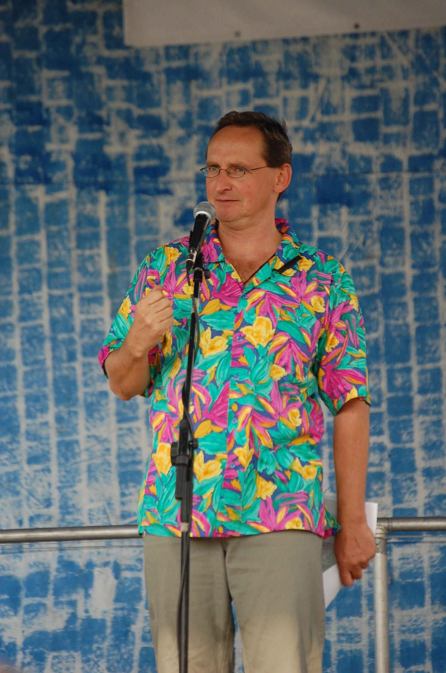 Wojciech Cejrowski podczas akcji "Sprawdź, czy Twoje picie jest bezpieczne" w Lublinie na Placu Litewskim